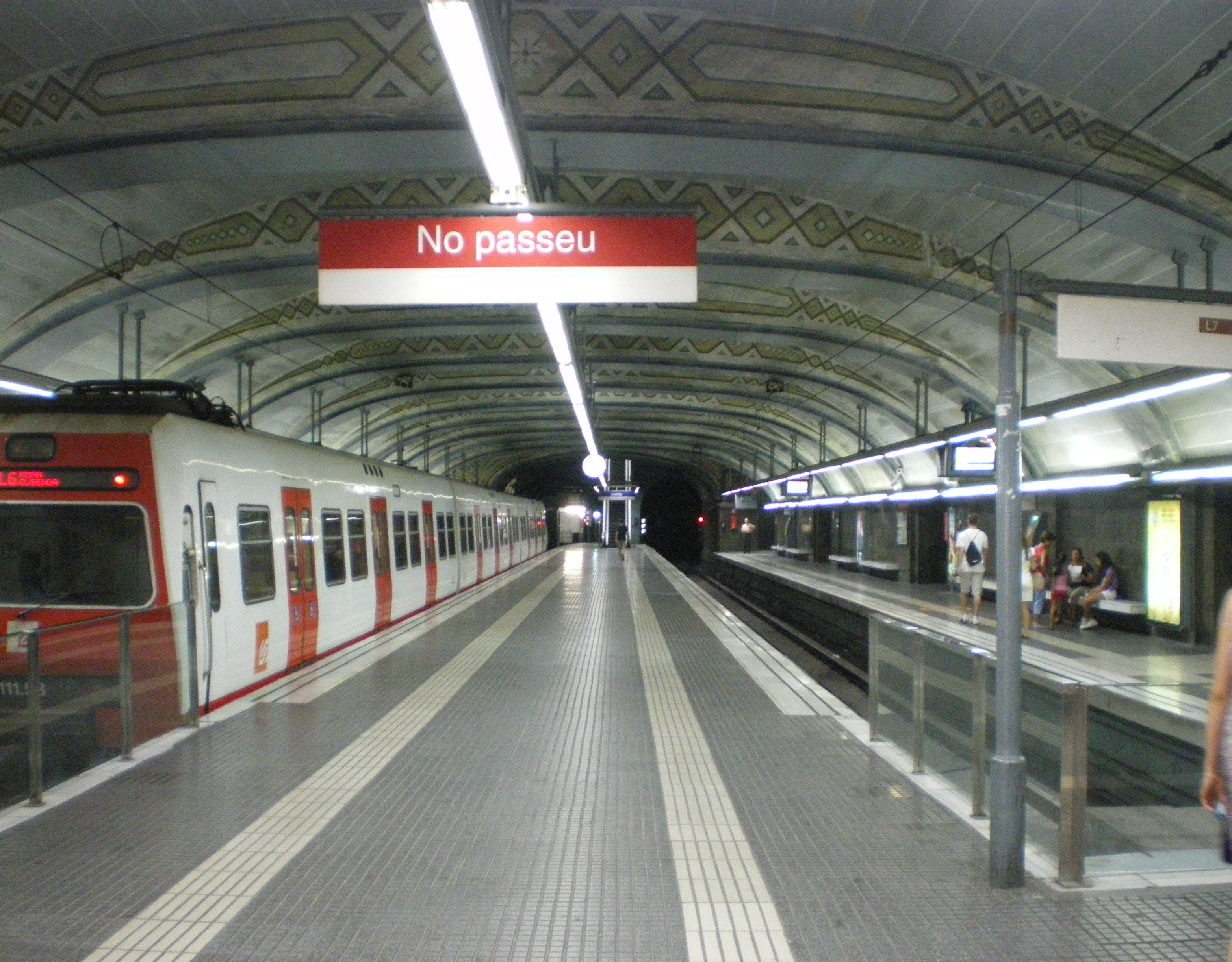 Station Plaça de Catalunya FGC